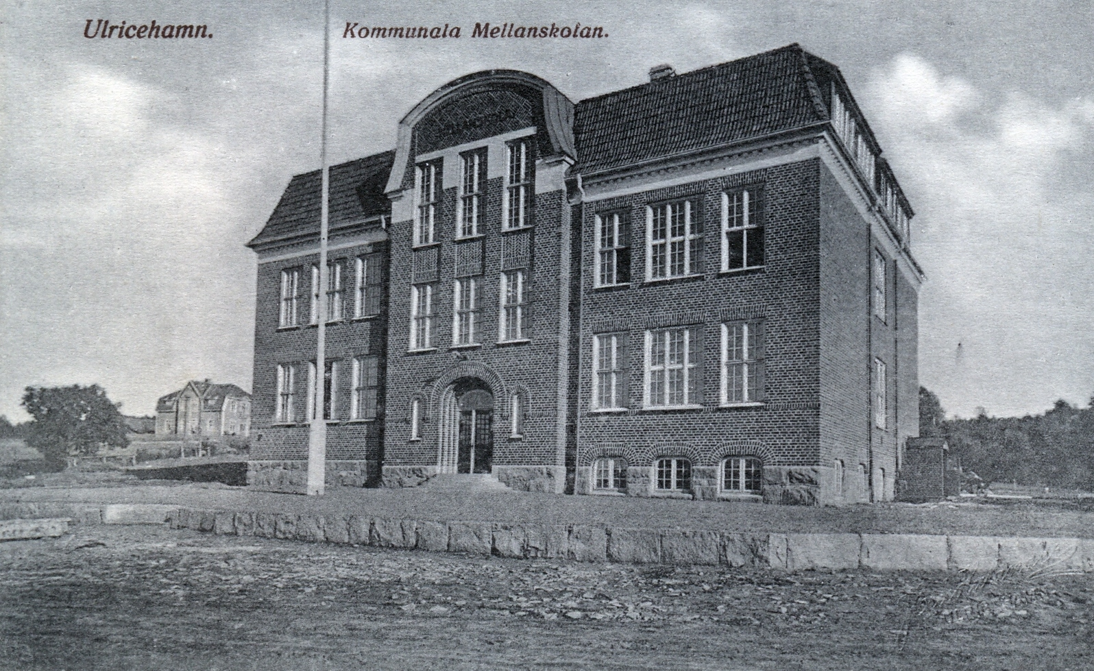 Kommunala mellanskolan i Ulricehamn. Fanns som skola från 1914 och har sedan efter flera tillbyggnader varit först Ulricehamns samrealskola, från 1966-1970 högstadium och gymnasium med namnet Stenbocksskolan. Gymnasiedelen flyttade till Tingsholmsgymnasiet år 1970. Stenbockskolan finns fortfarande kvar med samma byggnad som huvudbyggnad.